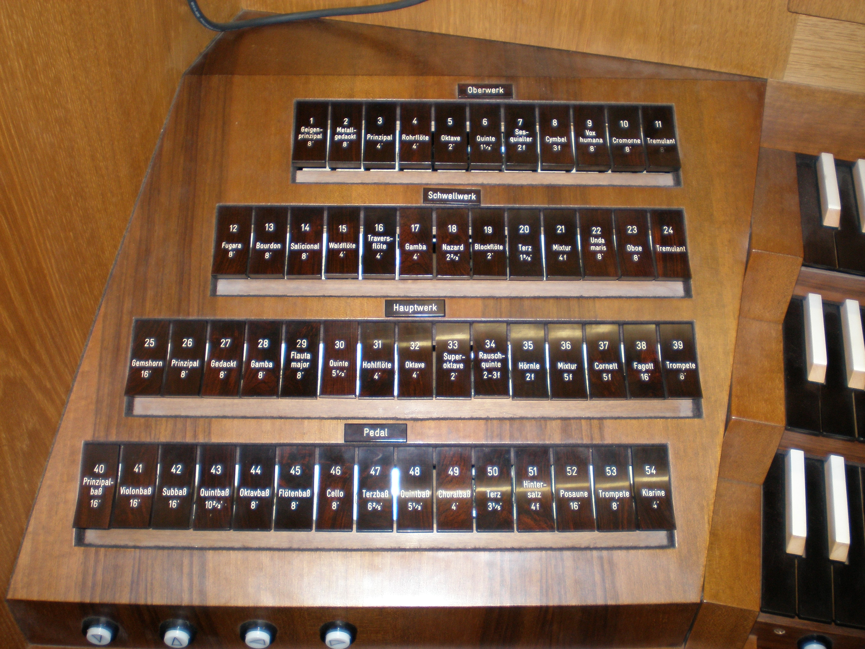 Registri orgulja varaždinske katedrale